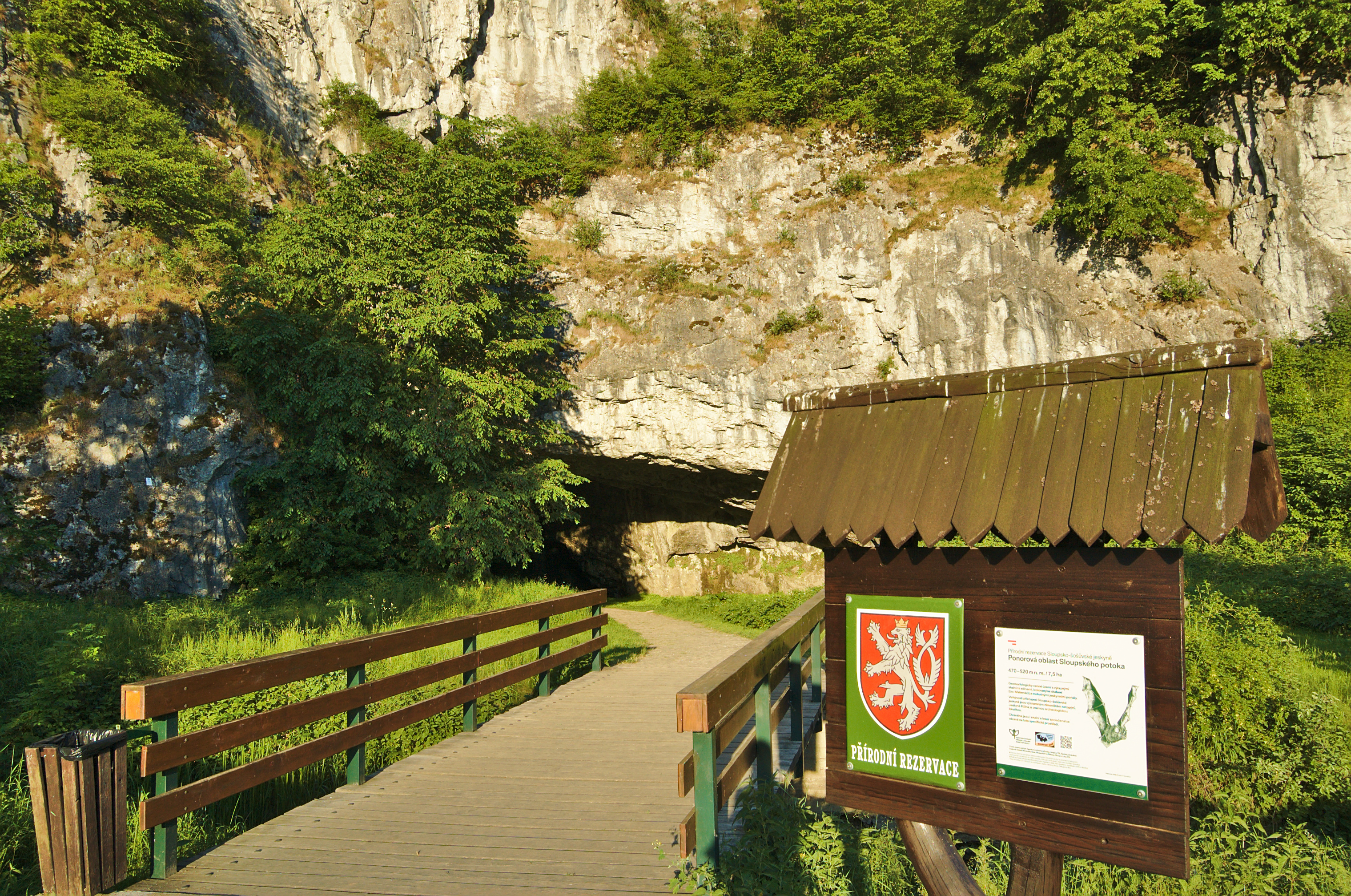 Vstup do jeskyní, přírodní rezervace Sloupško-Šošůvské jeskyně, okres Blansko